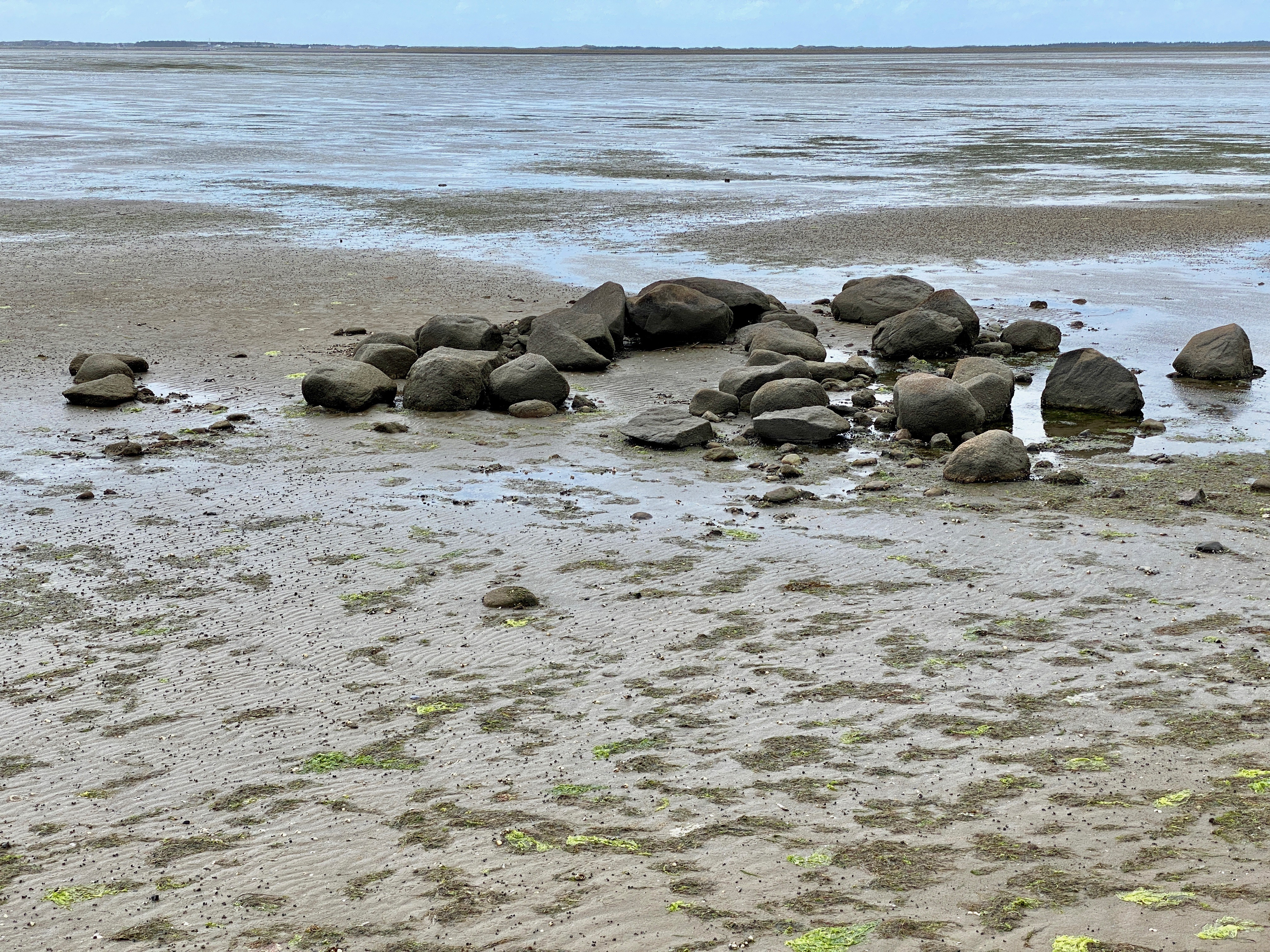 Hünenbett von Archsum 1 bei Archsum auf Sylt (Deutschland/Germany), Sprockhoff-Liste Nr. 7, 28.06.2020